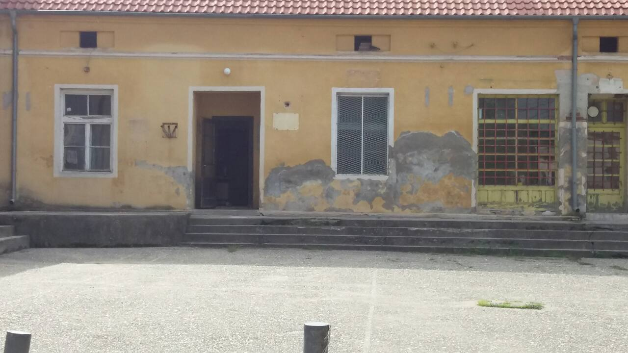 Српски (ћирилица): Центар села Средњева